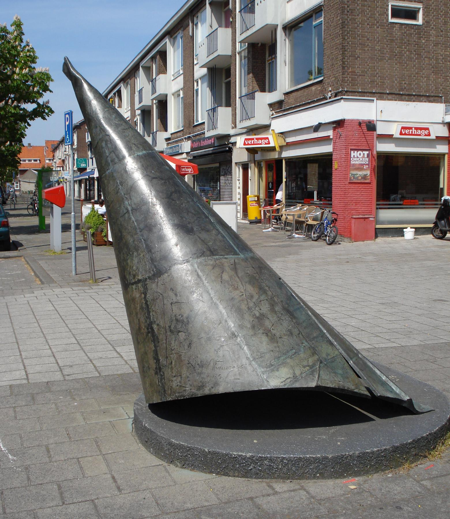 Rotterdam, Overschie. Kunstwerk zonder titel (man en vrouw) van Per Abramsen. Rotterdam/The Netherlands.